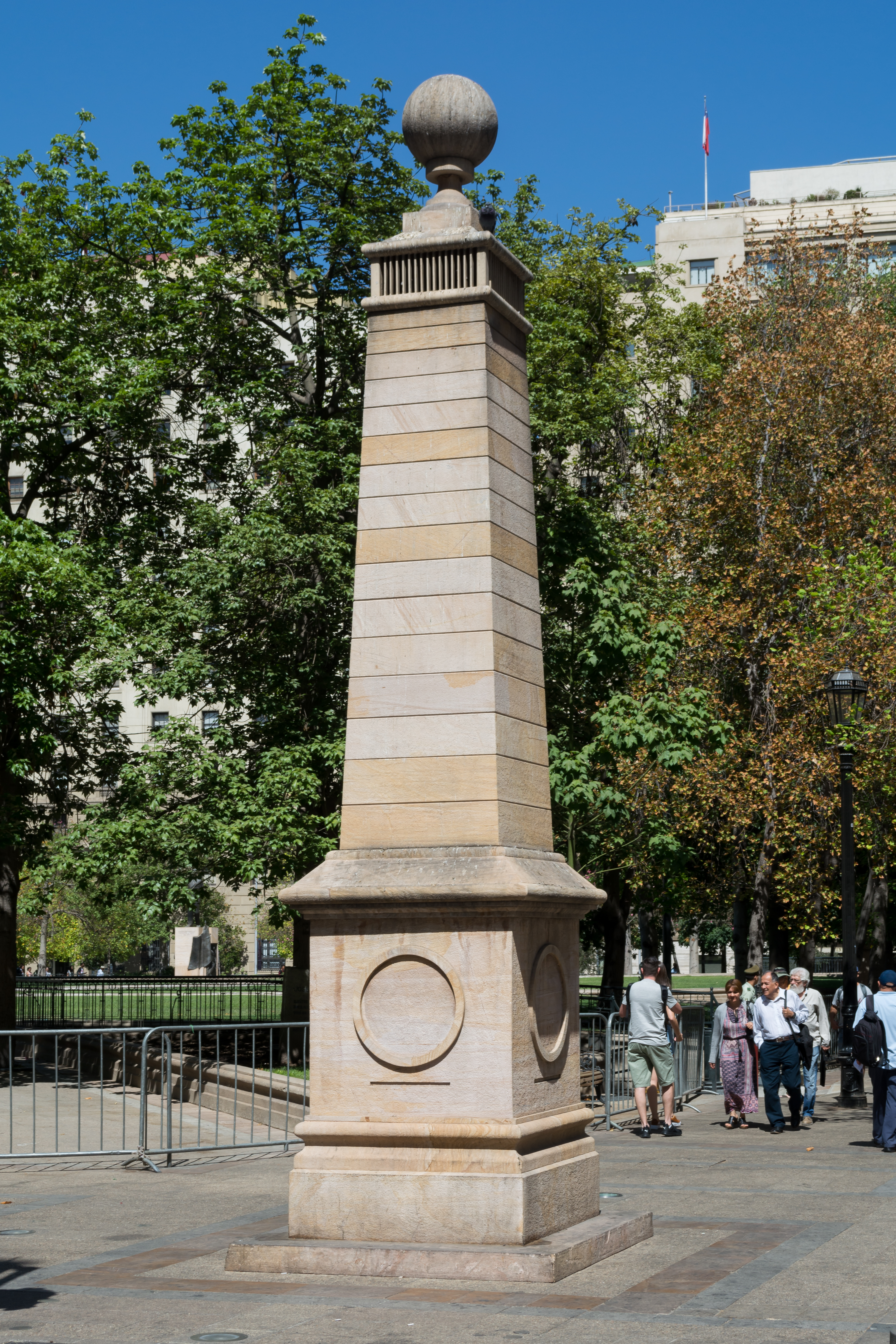 Obelisco de la plaza Constitución, Santiago, Región Metropolitana, Chile